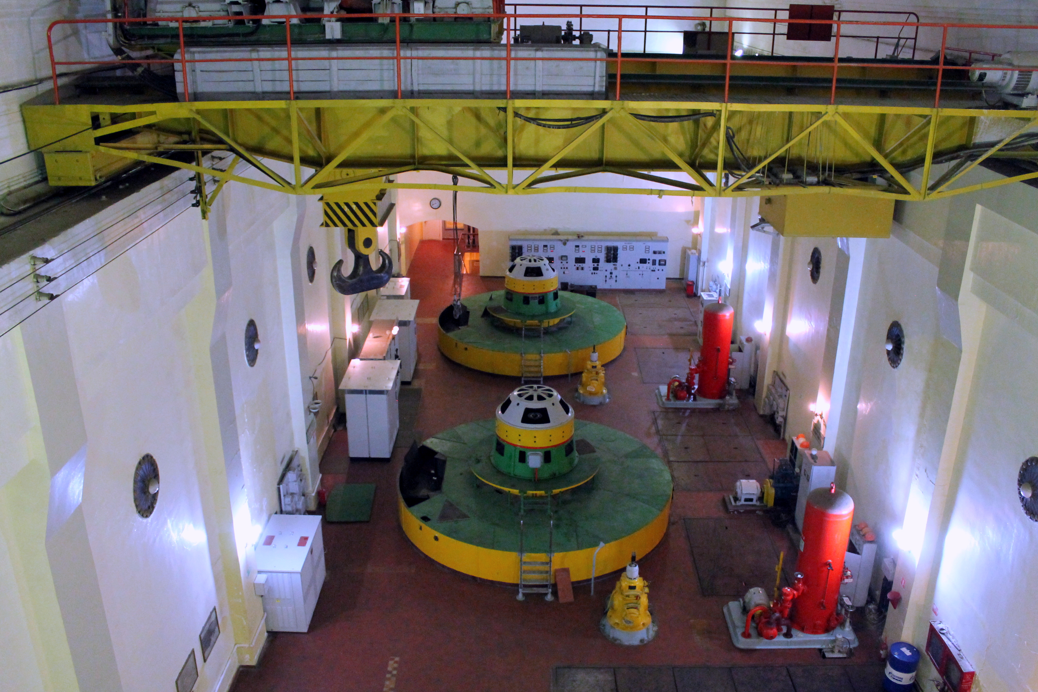 Машинный зал Севанской ГЭС